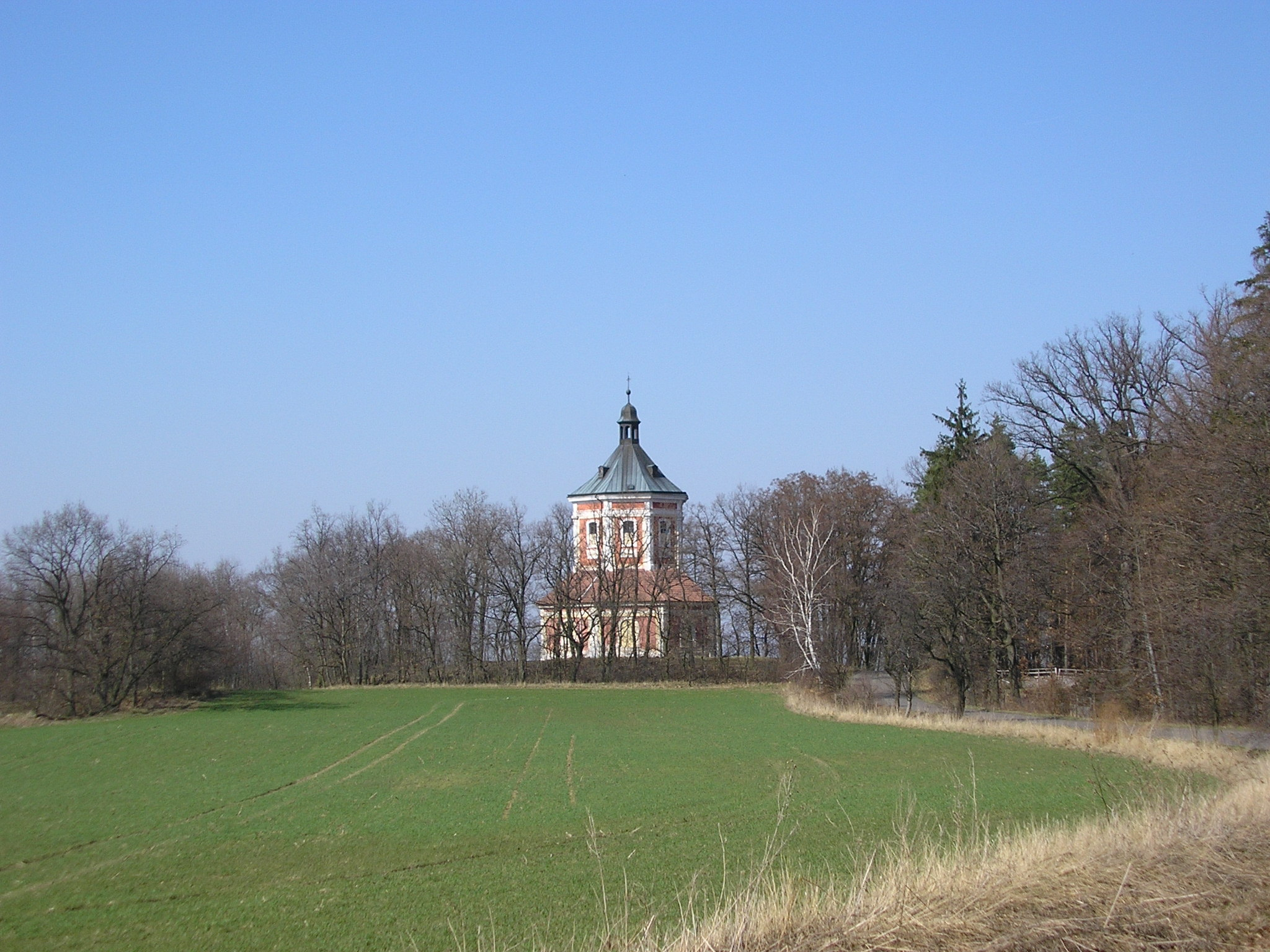 Kaple Nanebevzetí Panny Marie, jihovýchodně od vsi, Schořov.